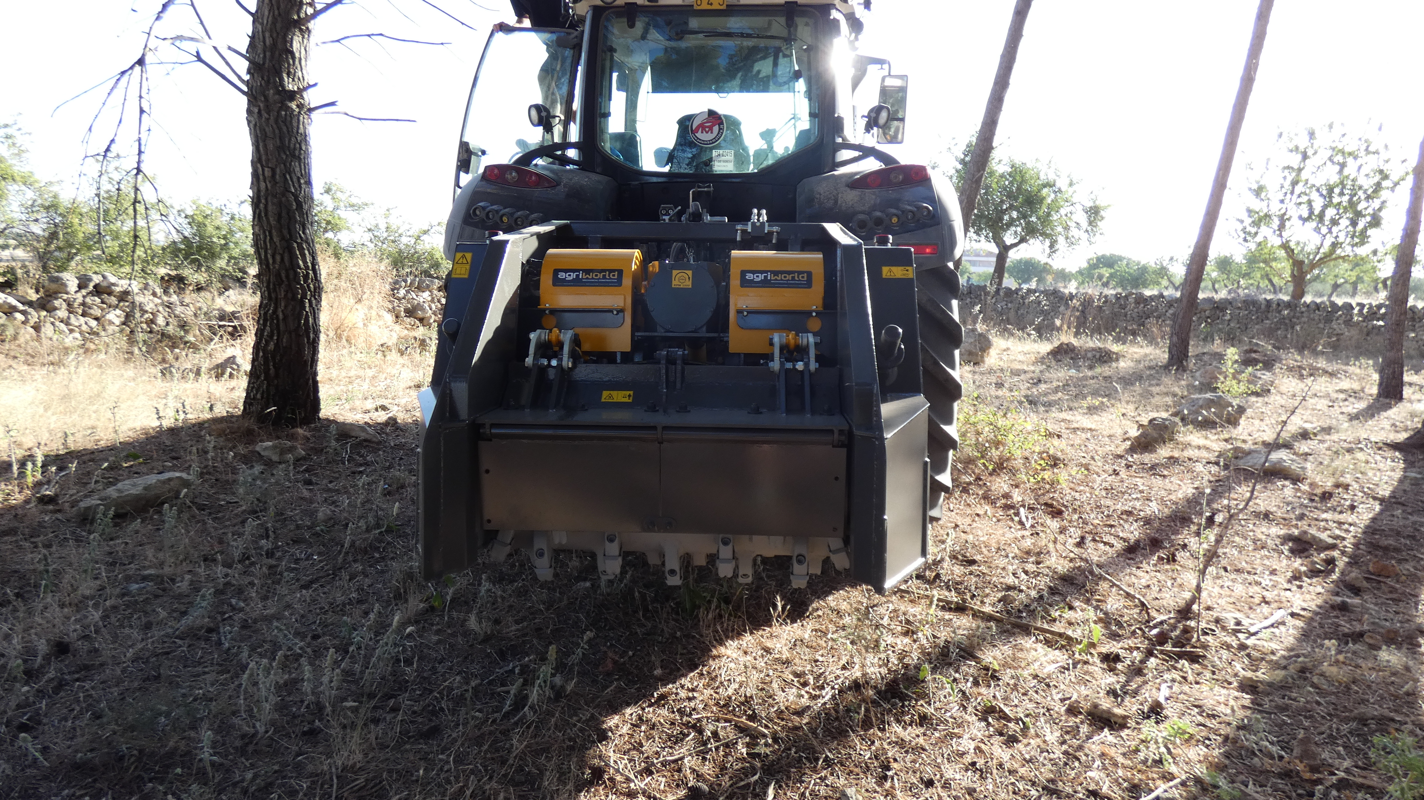 Ротоватор в деле